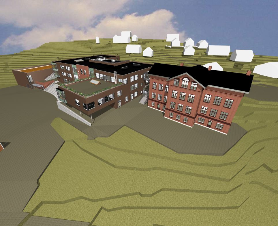 Evje skole skal rehabiliteres og oppgraderes til en fullverdig 2-parallell skole. Planlagt byggetid desember 2008- februar 2010. Hele prosjektet har en kostnadsramme på 227,4 millioner kroner.